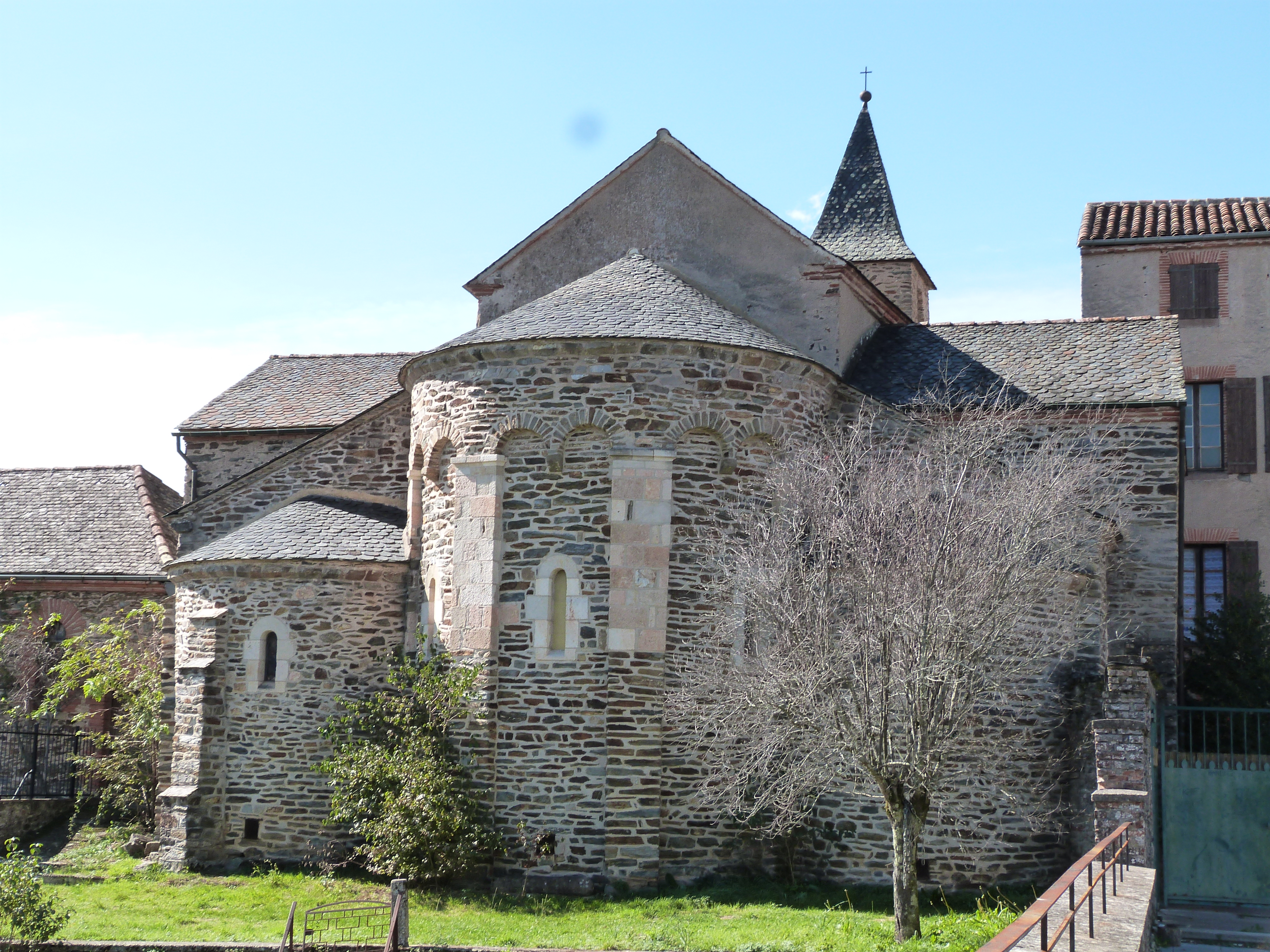 Chevet du Prieuré d'Ambialet